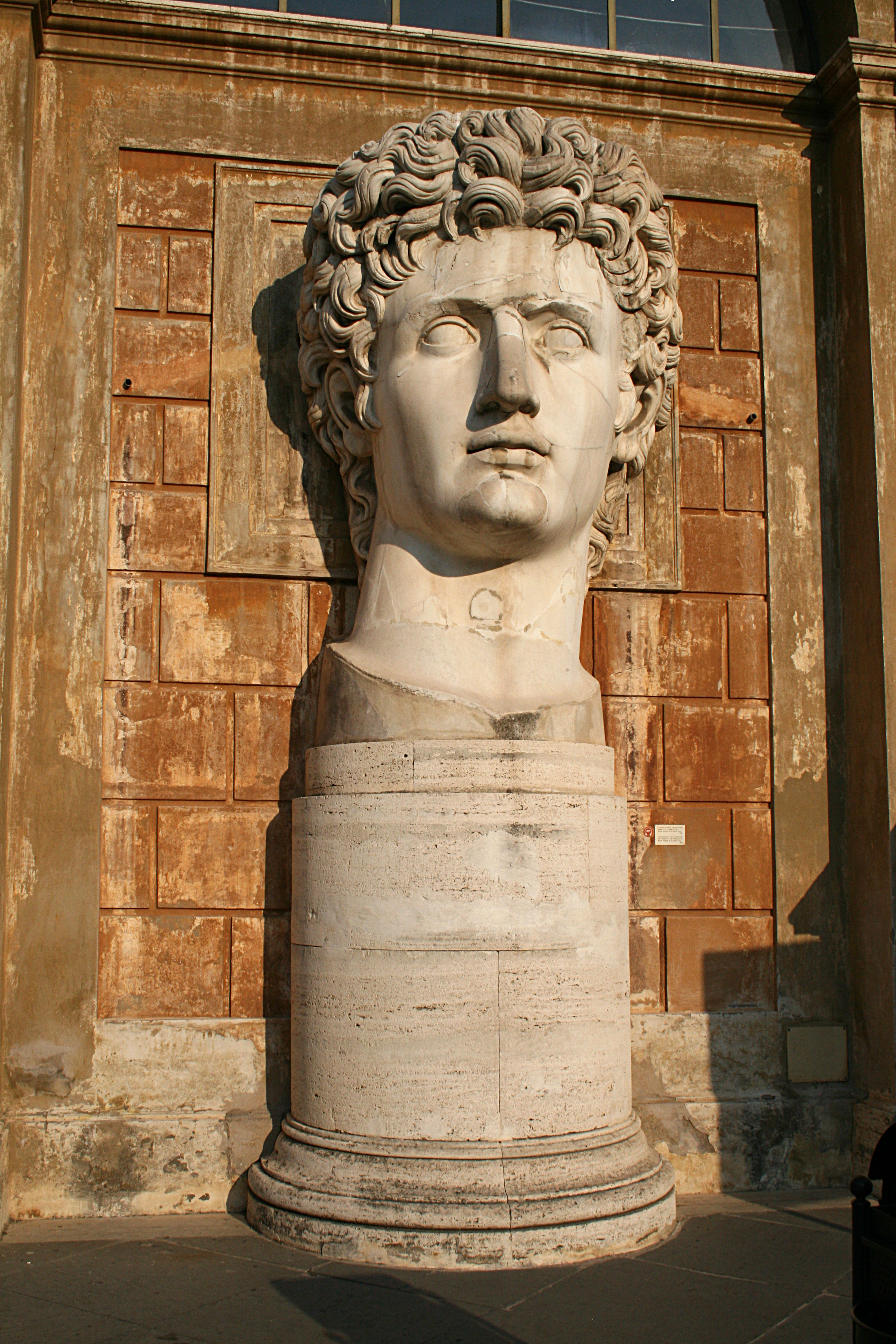 Buste munemental du premier empereur romain Auguste - Cortile della Pigna (Musées du Vatican).